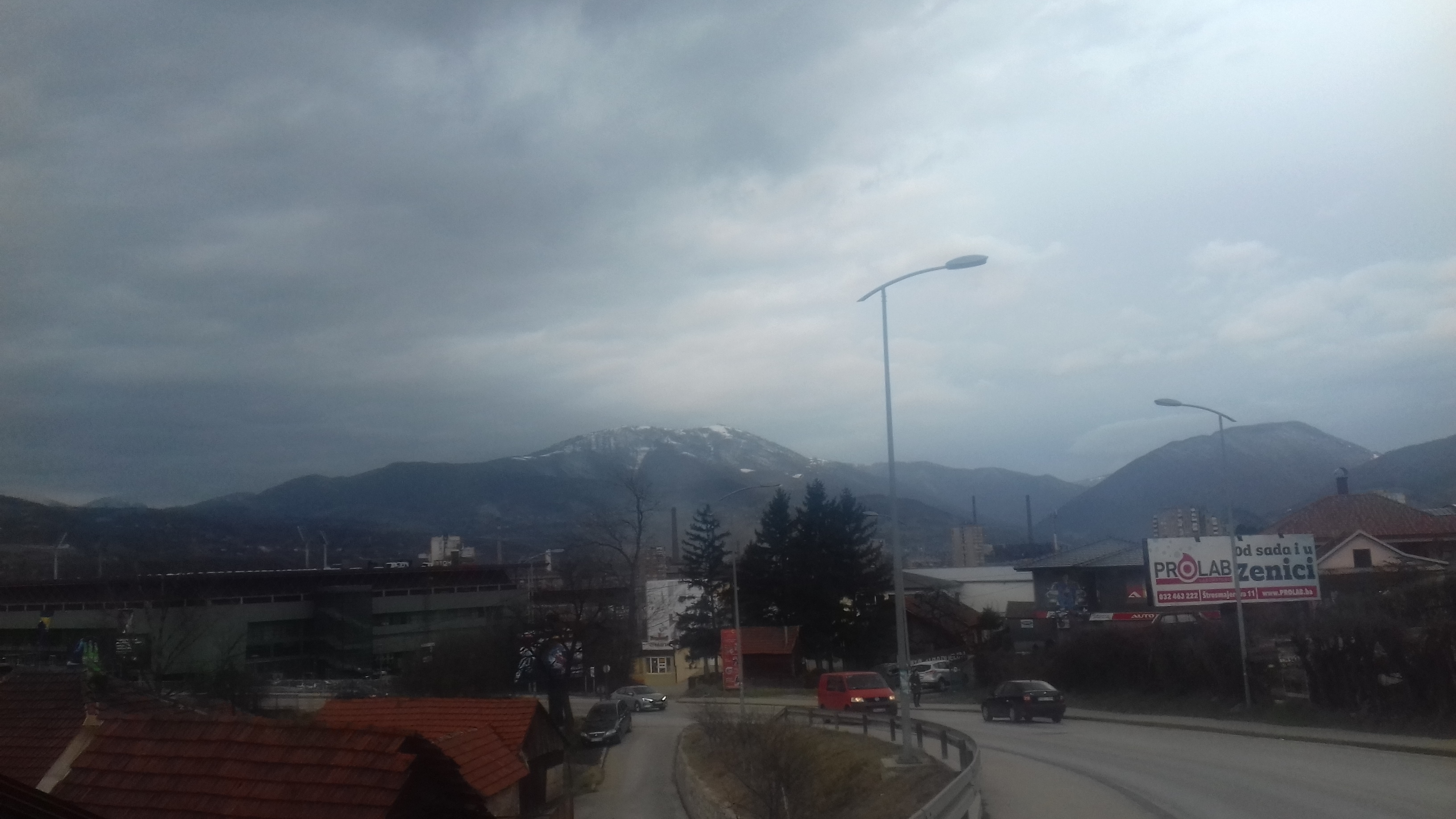 Поглед са Црквичког брда на Лисац (и Влашић, лијево од Лисца, у даљини)